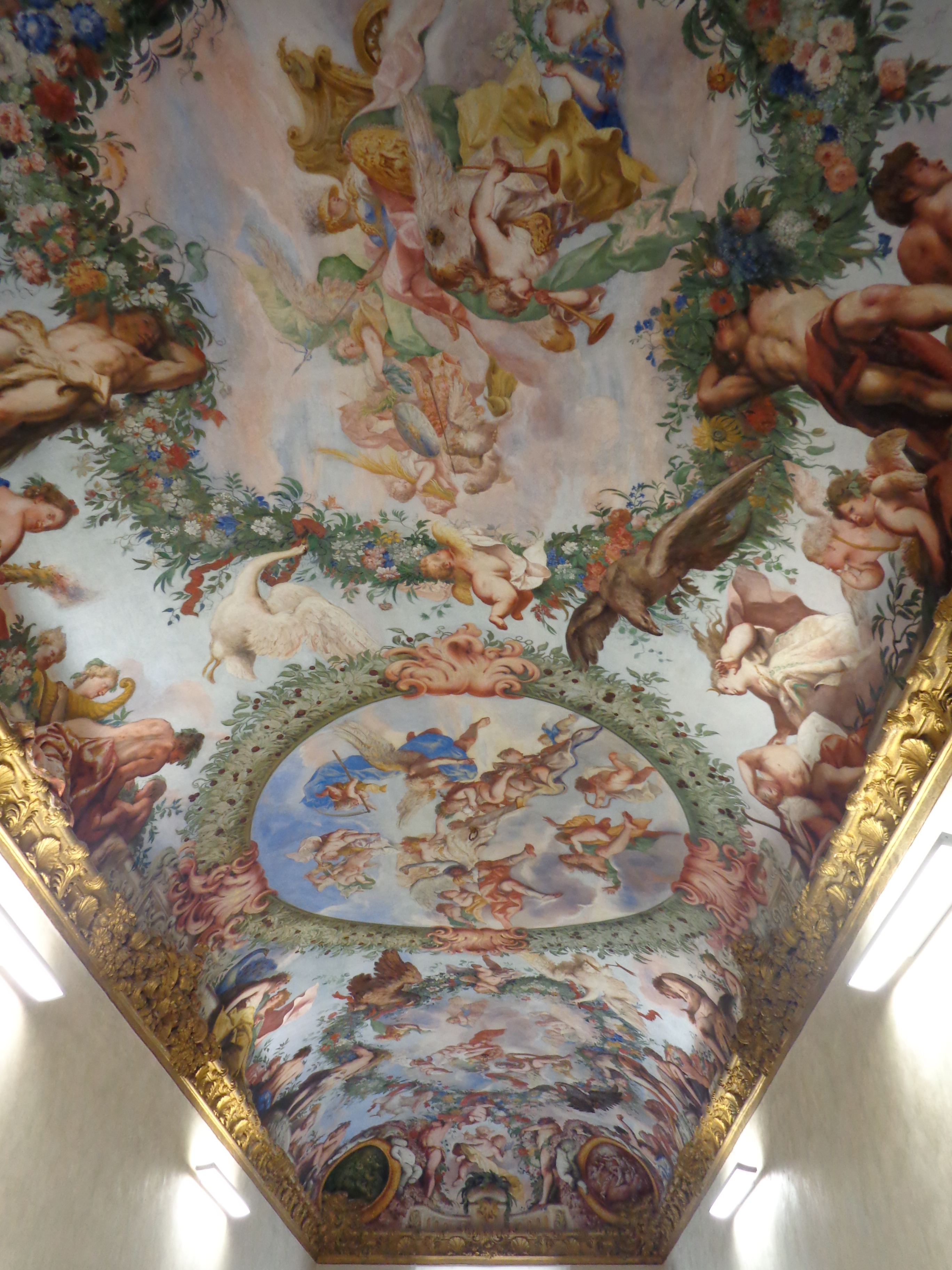 Palazzo Pitto, Genova